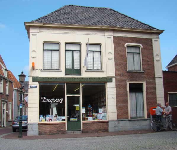 Gemeentemonument in Bredevoort